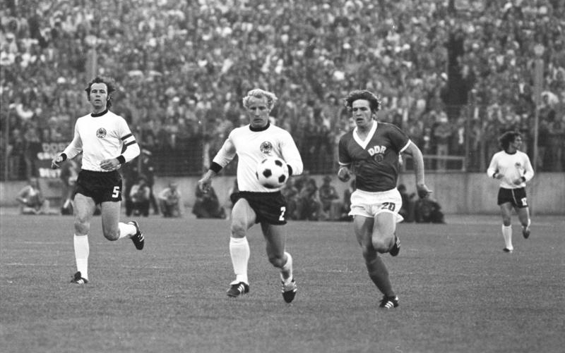 ADN-ZB/Mittelstädt/22/6/74/BRD/Hamburg: X. Fußball-Weltmeisterschaft/1. Finalrunde, Gruppe 1: DDR - BRD 1:0/DDR-Stürmer Martin Hoffmann (rechts) und Verteidiger Berti Vogts (Mitte) stürmen dem Ball nach. Links Franz Beckenbauer (beide BRD).